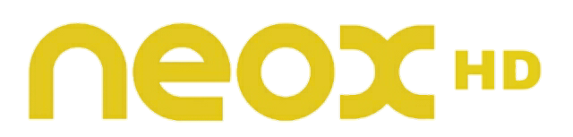 NeoxHd